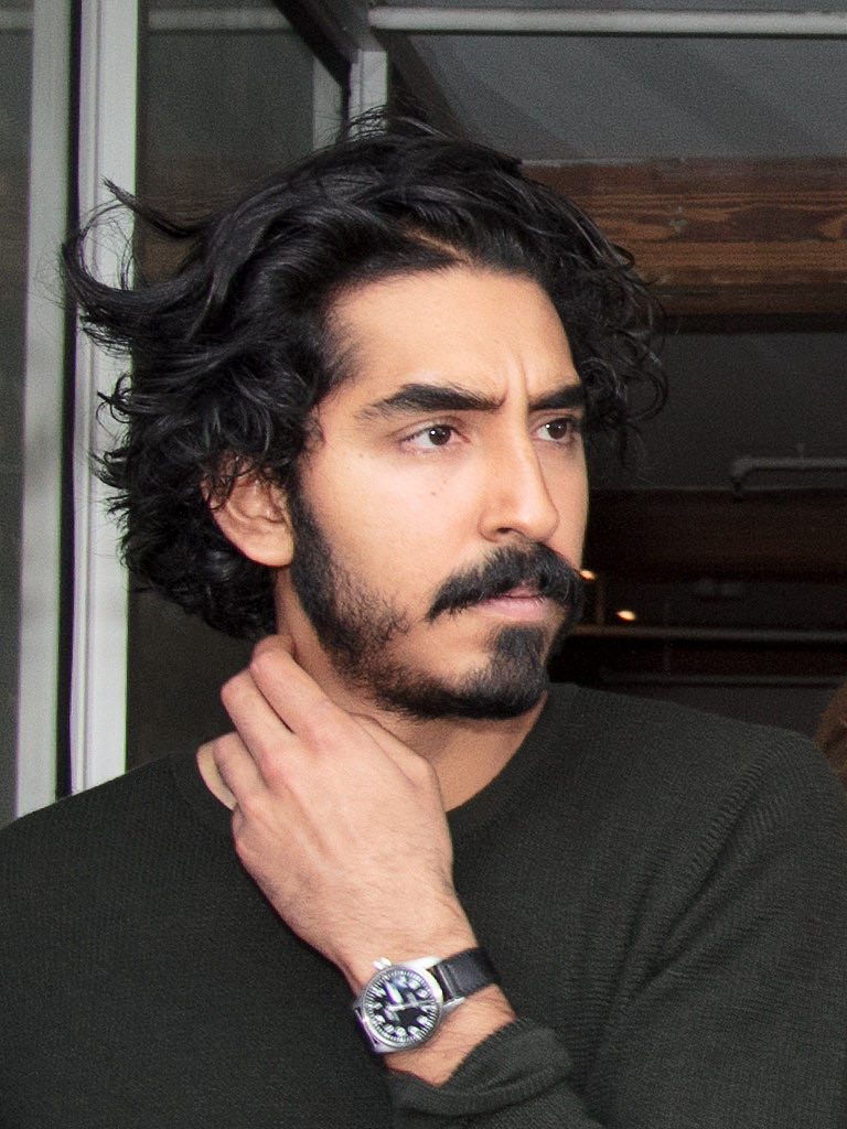 Toronto International Film Festival 2016